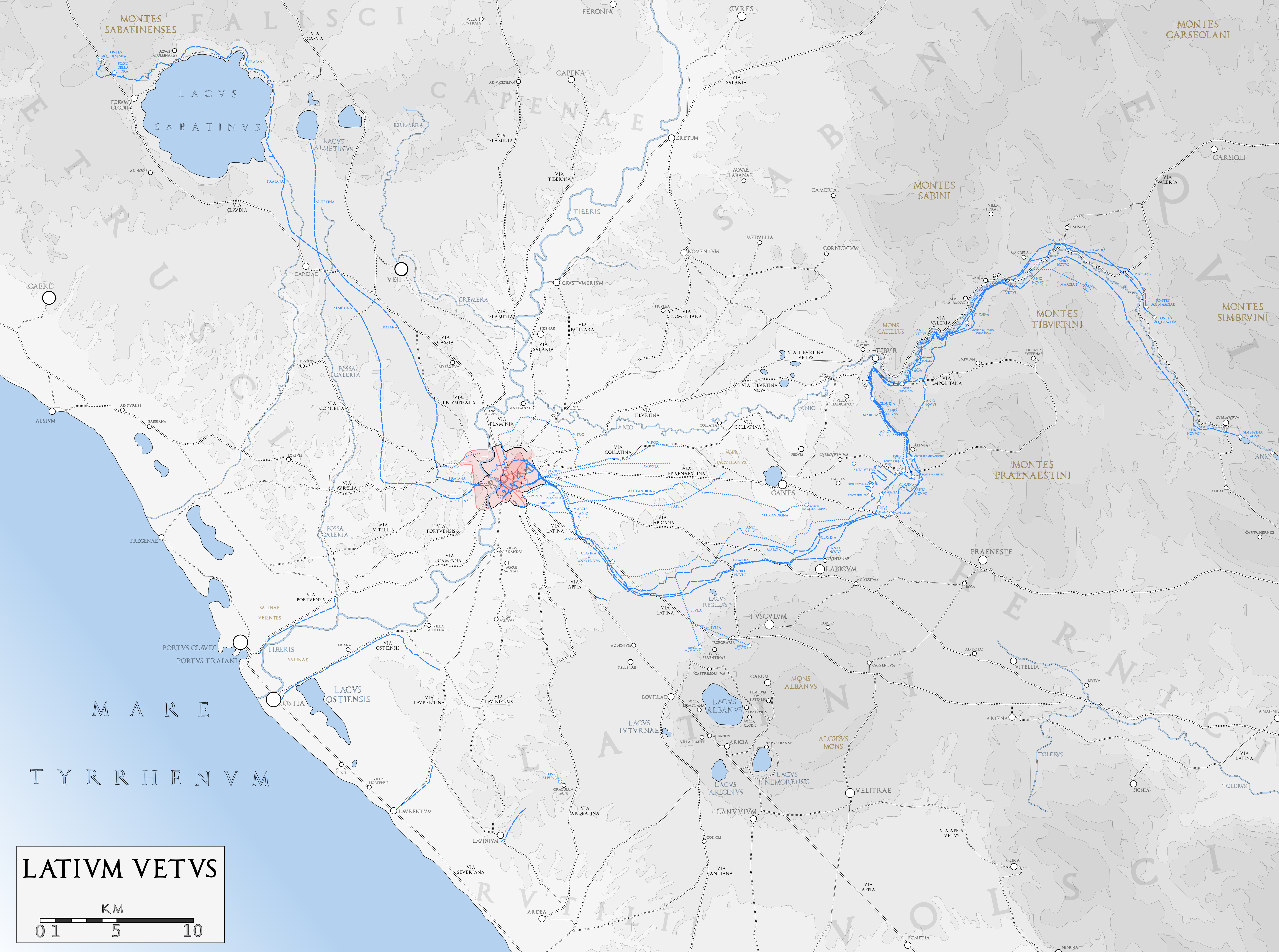 Carte du Latium antique sur lequel figure le tracé des aqueducs de Rome. D'après un fond de carte de 1886 (G. Droysens Allgemeiner Historischer Handatlas).